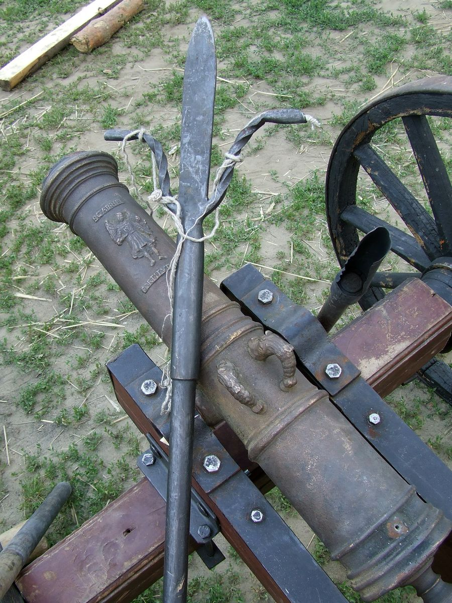 Lontownica, współczesna rekonstrukcja